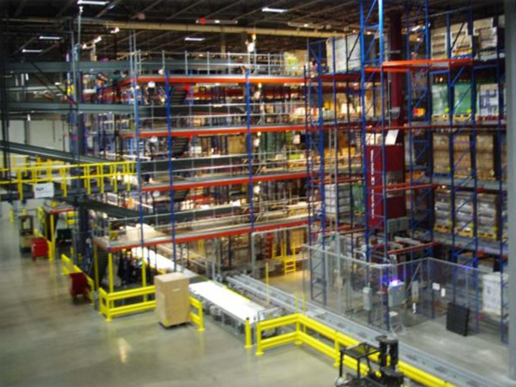 Duplicação das áreas de estocagem para o Suprimento de Aviação, das áreas destinadas a todas as principais Oficinas de Manutenção, das áreas para a manutenção das aeronaves e da Seção de Triagem de Reparáveis, com dois níveis de estocagem.